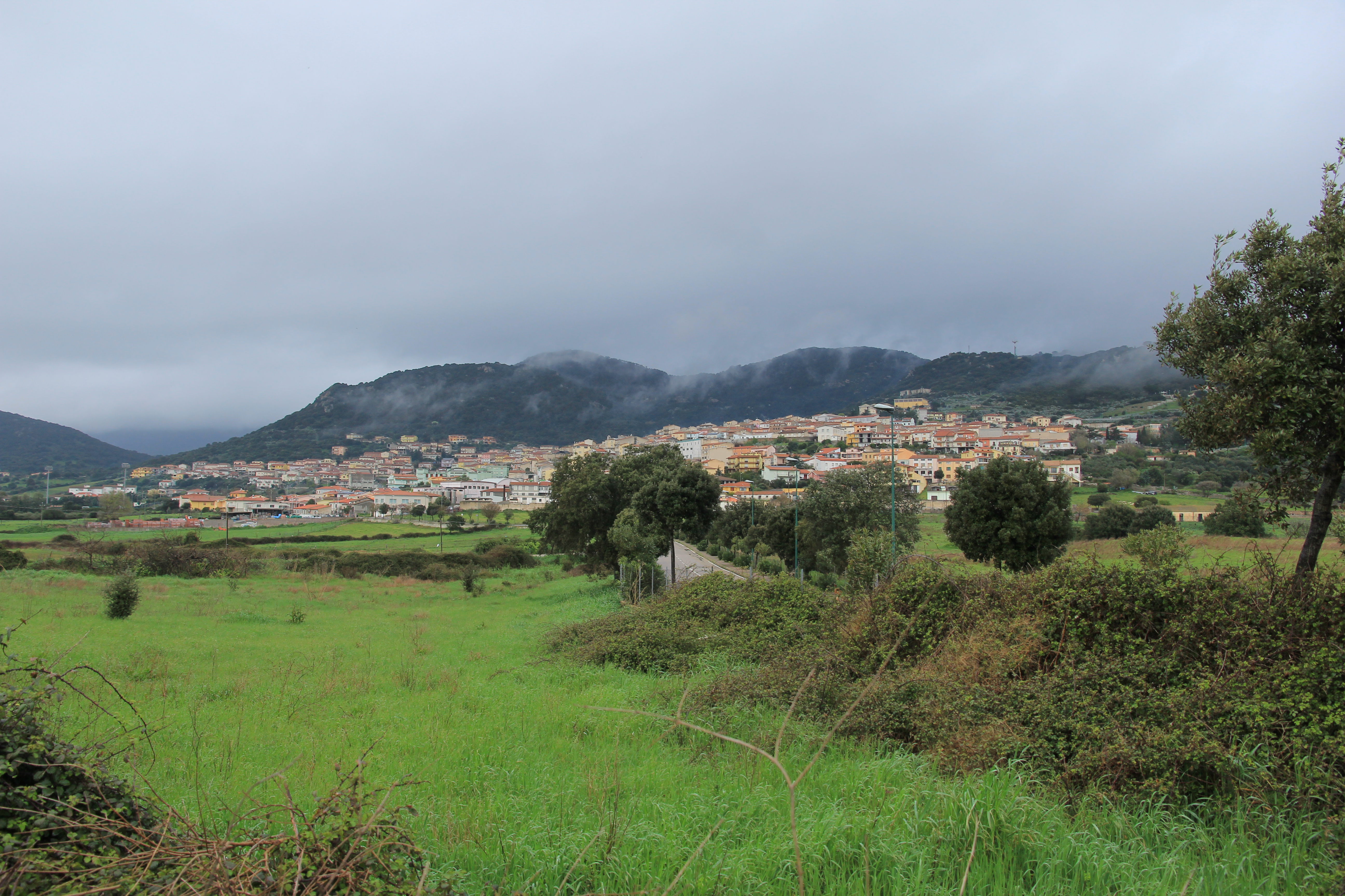 Berchidda